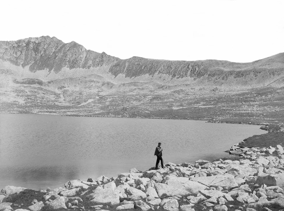 Imatge